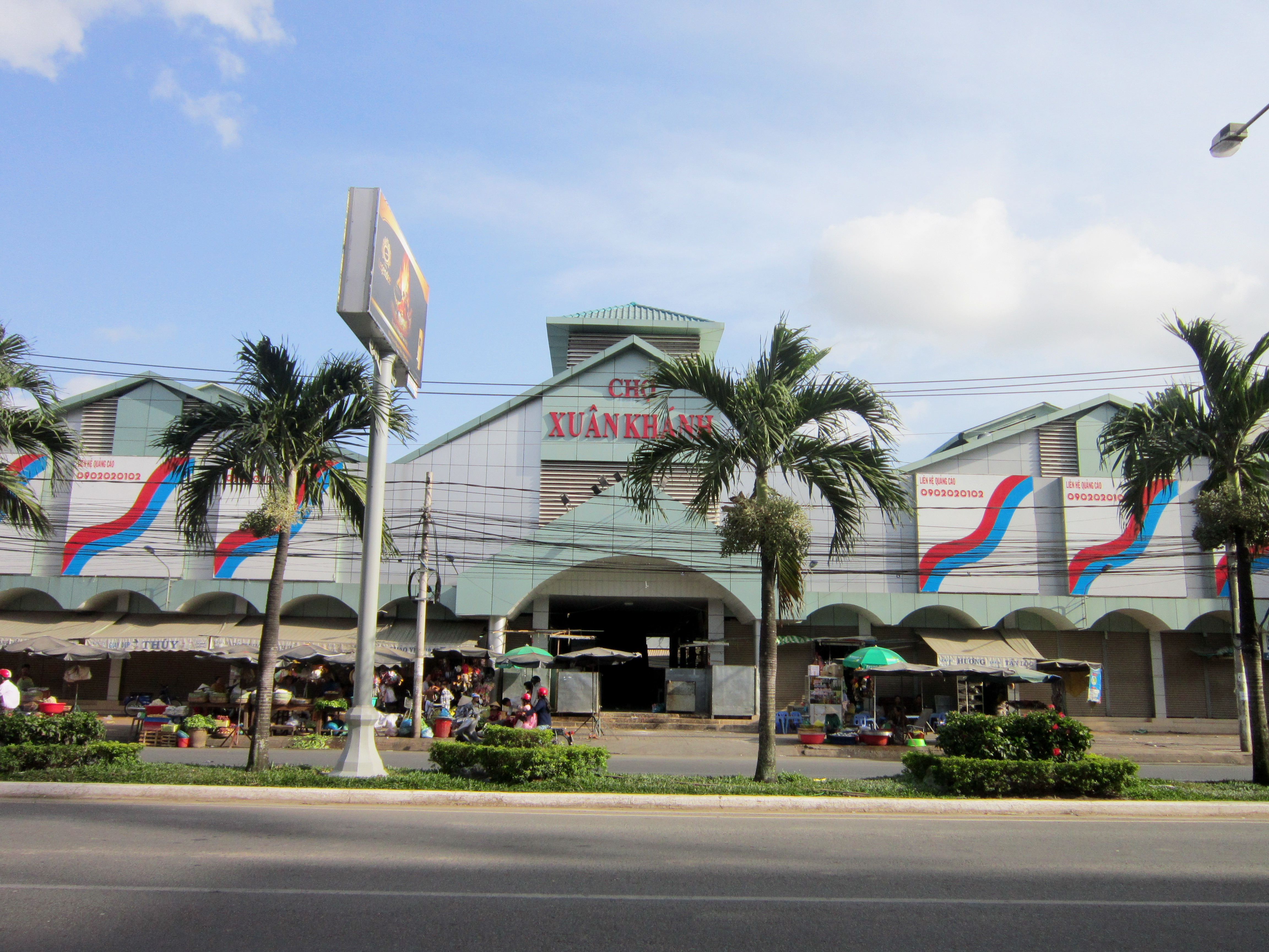 Chợ Xuân Khánh tọa lạc trên đường 30 tháng 4, TP. Cần Thơ. Tên cũ là chợ Tham Tướng. Đây là chức vụ của Mạc Tử Dung (hay Duyên, ?-1780), con của Tổng binh Mạc Thiên Tứ (1718-1780).